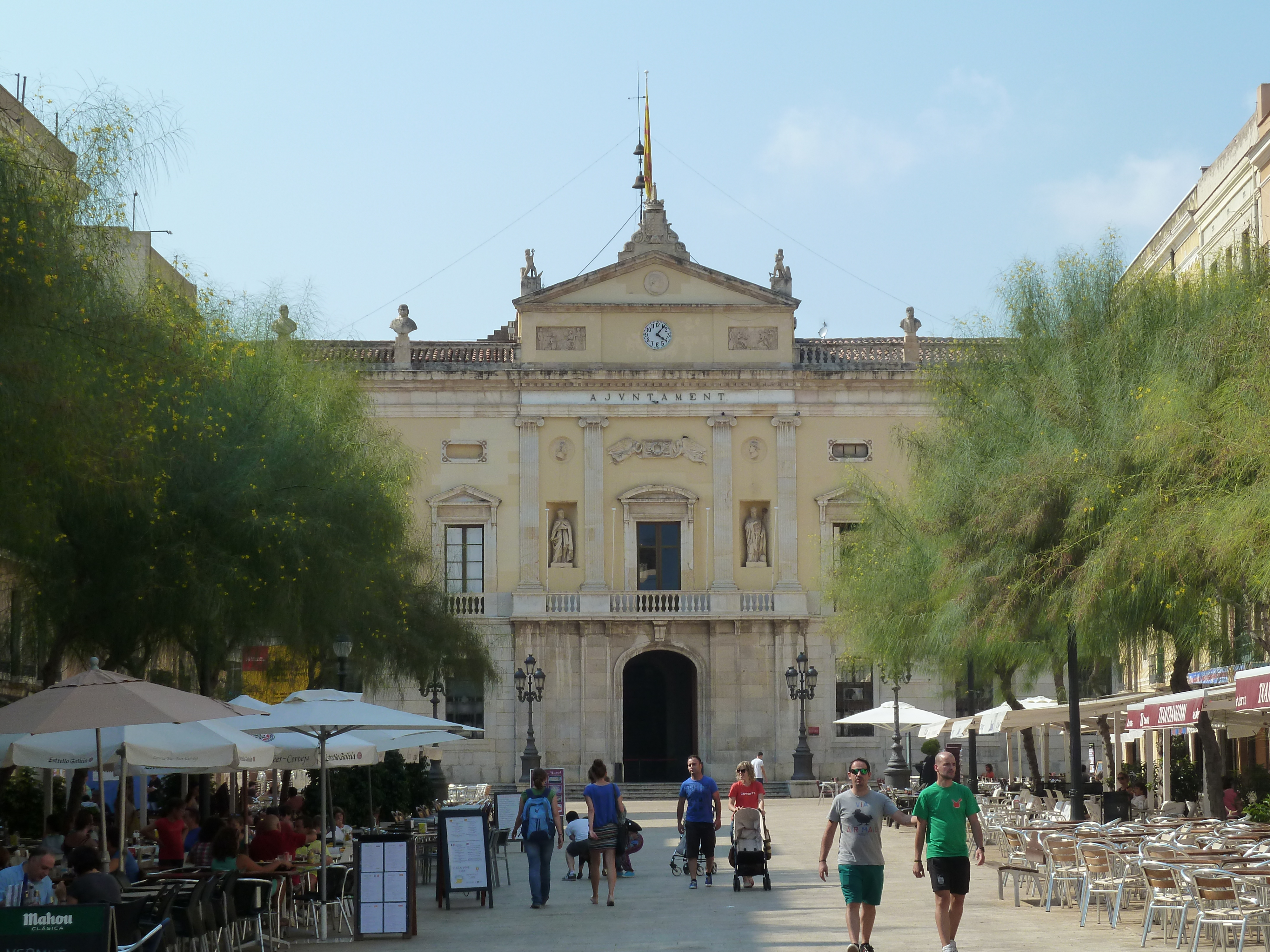 Tarragona